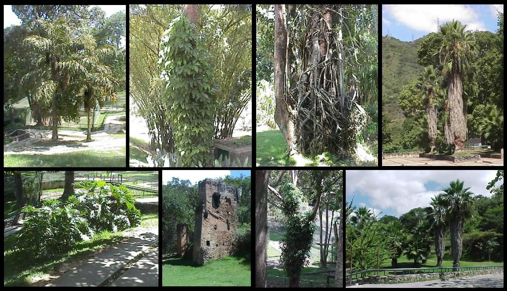 Paisajismo y vegetacion Zoologico de Caricuao. Caracas - Venezuela